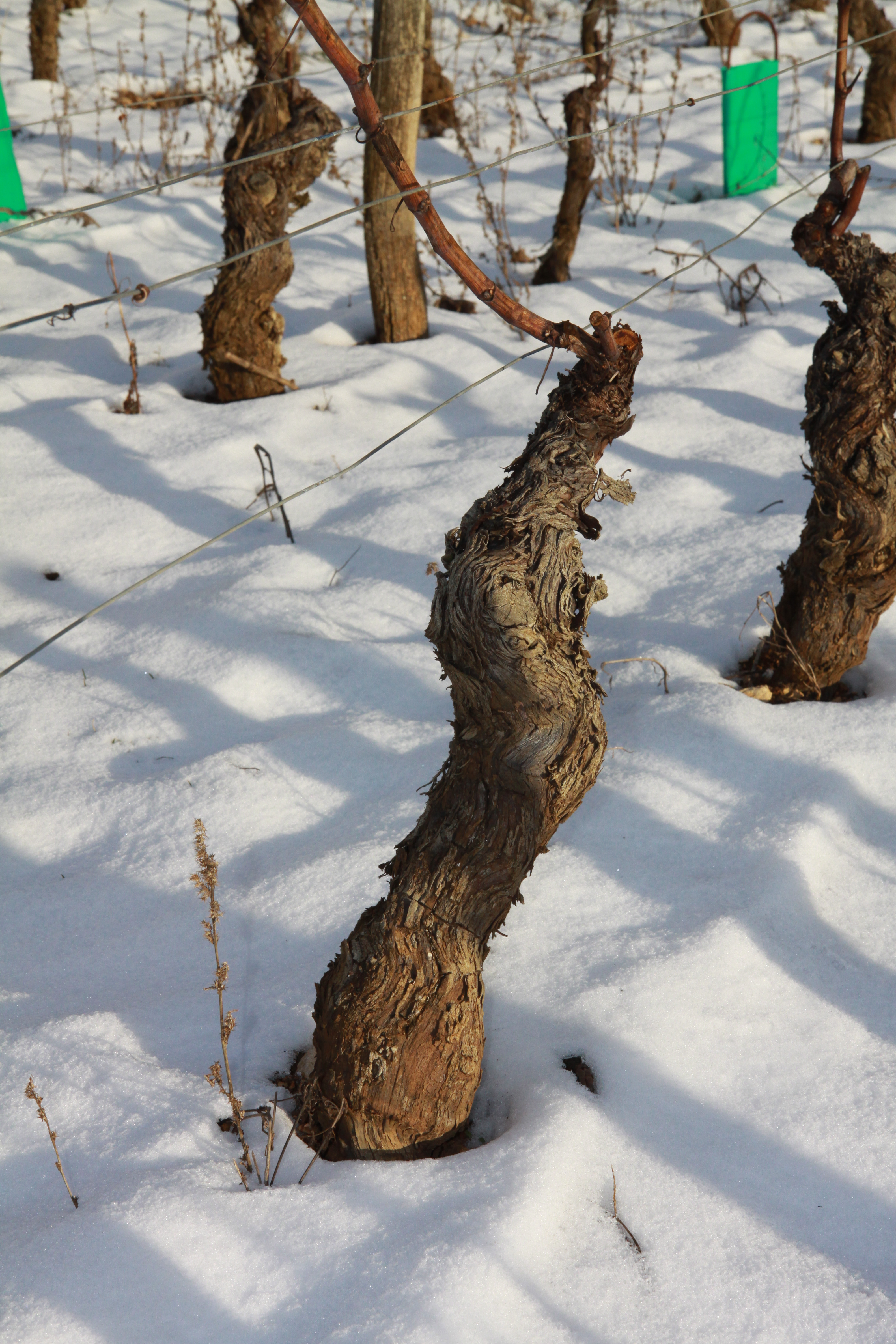 Marsannay-la-côte, vignoble de Bourgogne sous la neige.